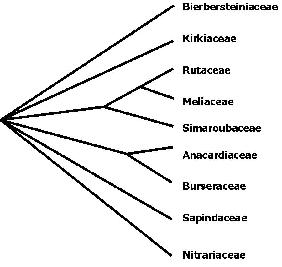 Tự vẽ lại theo APG. Sử dụng tự do.